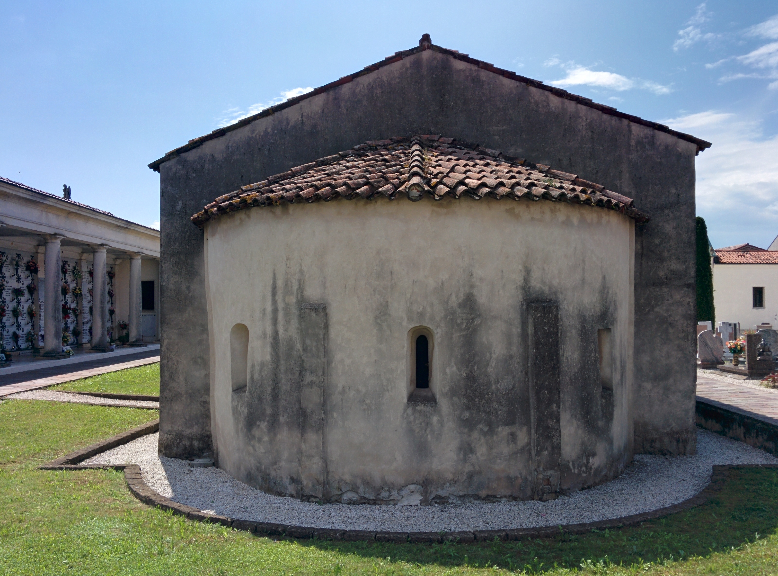 Abside della chiesetta di San Michele a Caldogno, provincia di Vicenza.